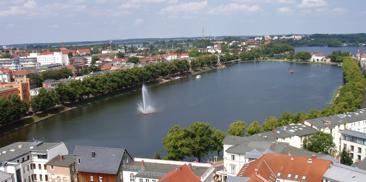 Lake Pfaffenteich in Schwerin (Germany)